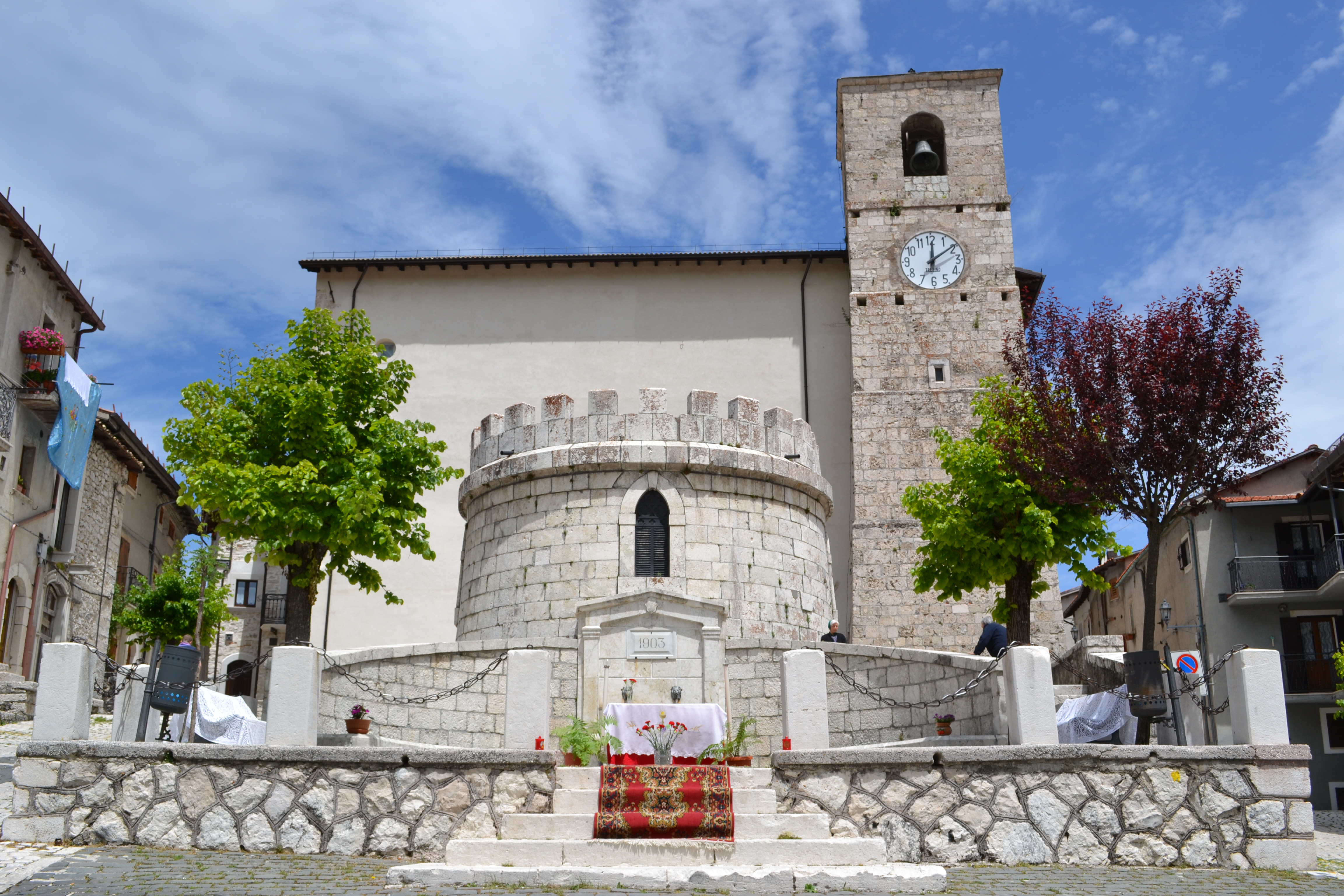 Centro storico di Opi Fontane e Monumenti Opi paese This is a photo of a monument which is part of cultural heritage of Italy.